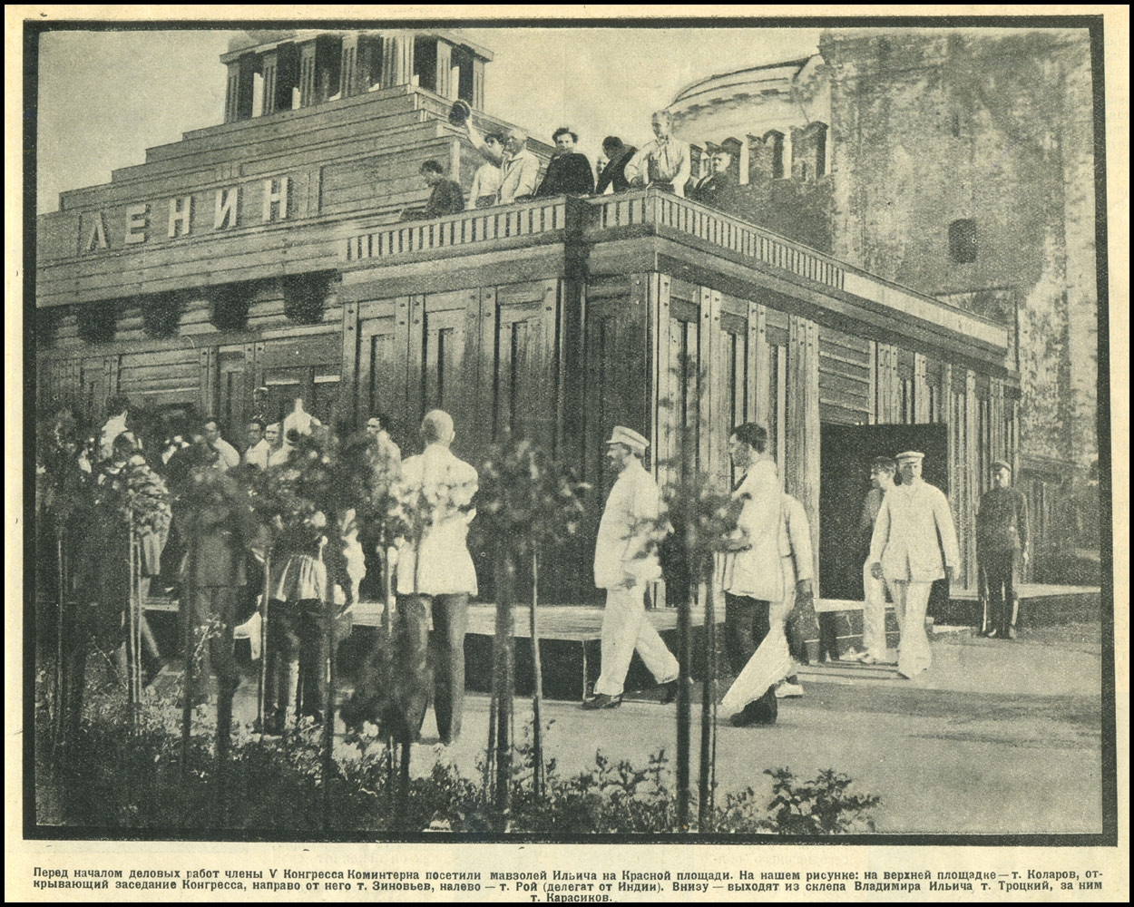 Делегаты V Конгресса Коминтерна у мавзолея Ленина. Москва, июнь 1924